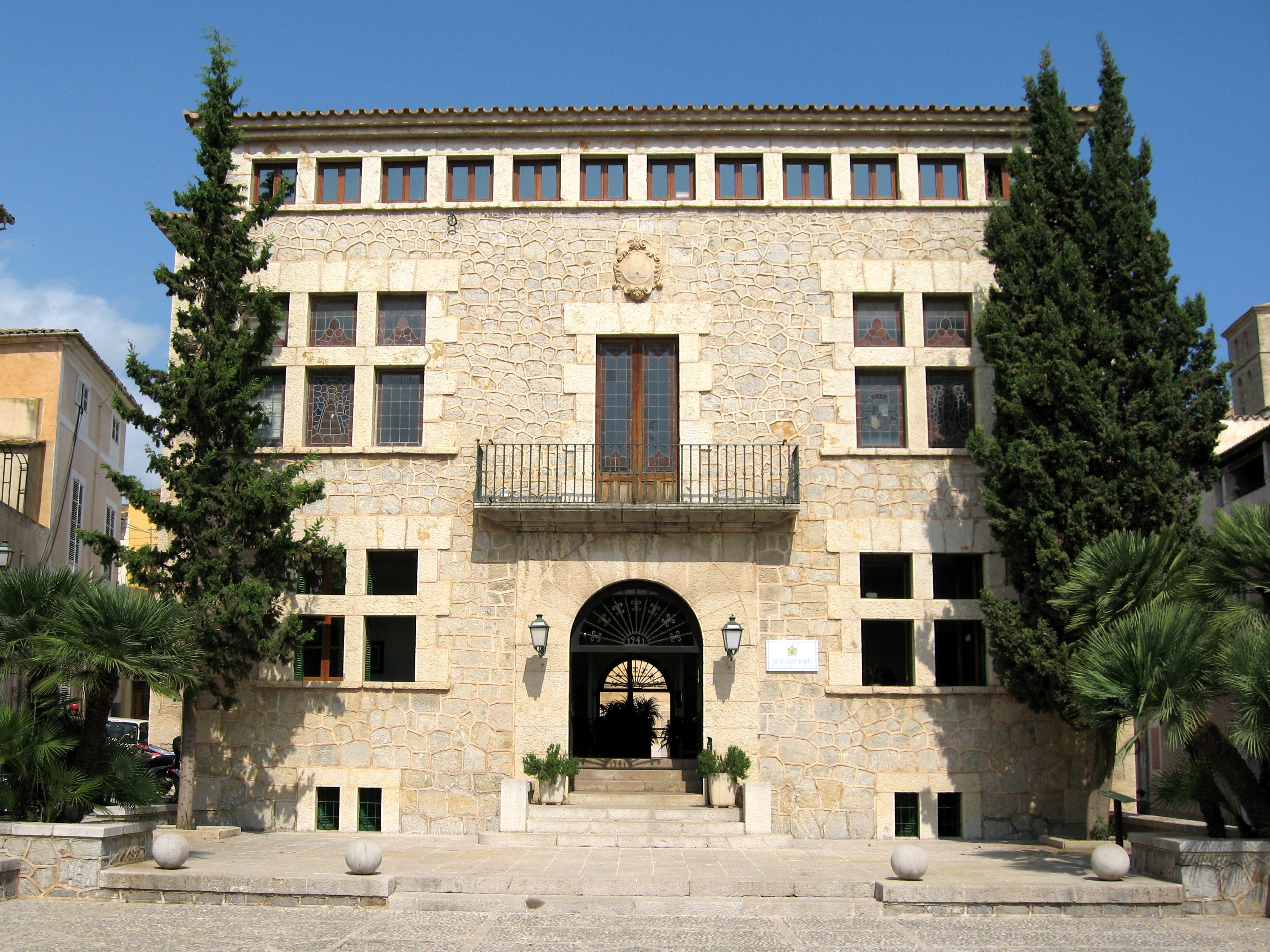 Ajuntament d'Artà, Plaça de l'Ajuntament, Artà, Mallorca, Spain